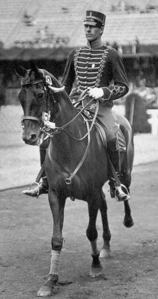 Axel Nordlander